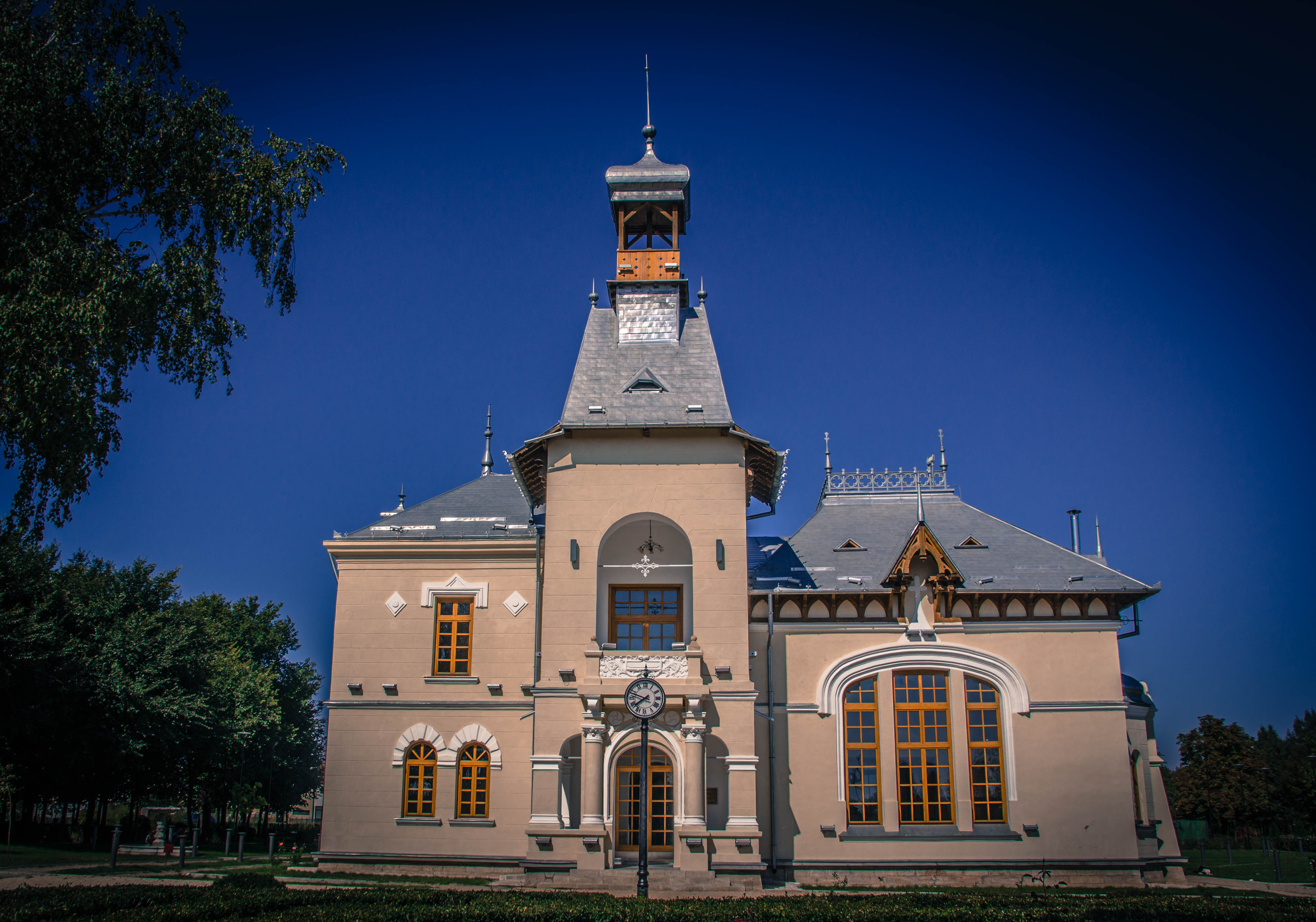 Fotografie cu participantii la expeditia Wiki Weekend 2015 facand fotografii pentru Wiki Loves Monuments 2015, Ansamblu Alexandru Marghiloman